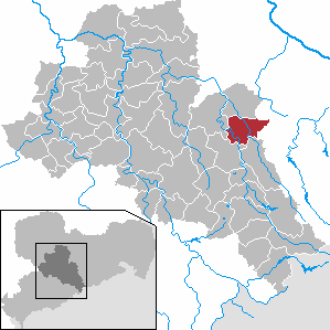 Halsbrücke in Saxony - district Mittelsachsen